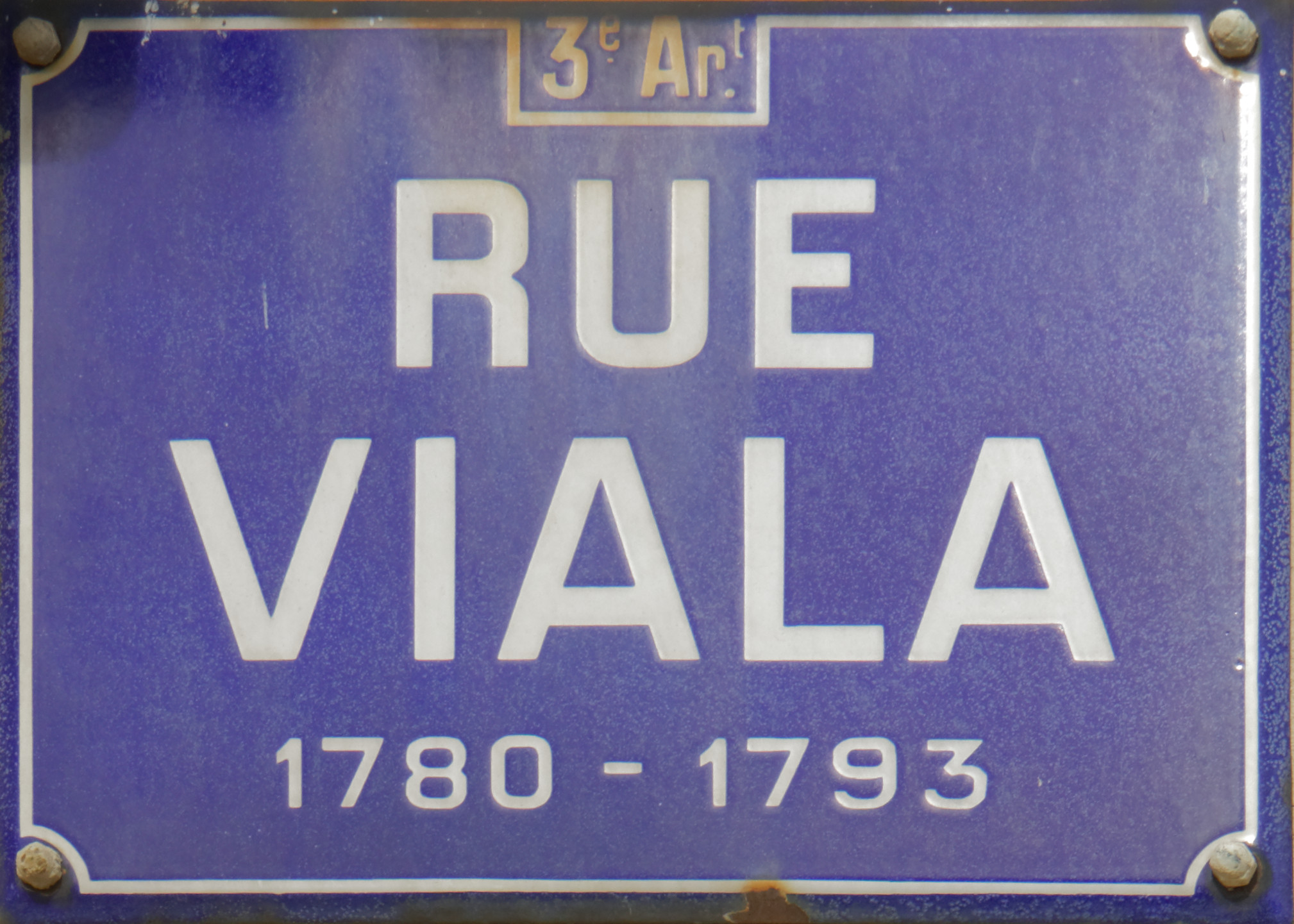 Plaque de la rue Viala à Lyon 3eme